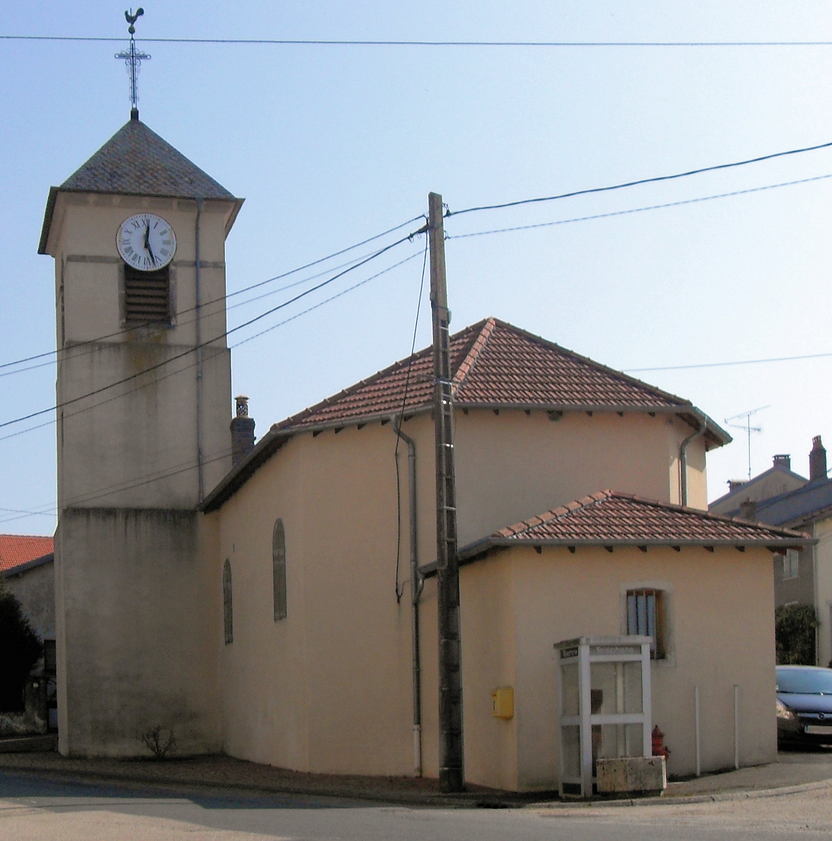 L'église de la Présentation de la Sainte-Vierge à Germonville